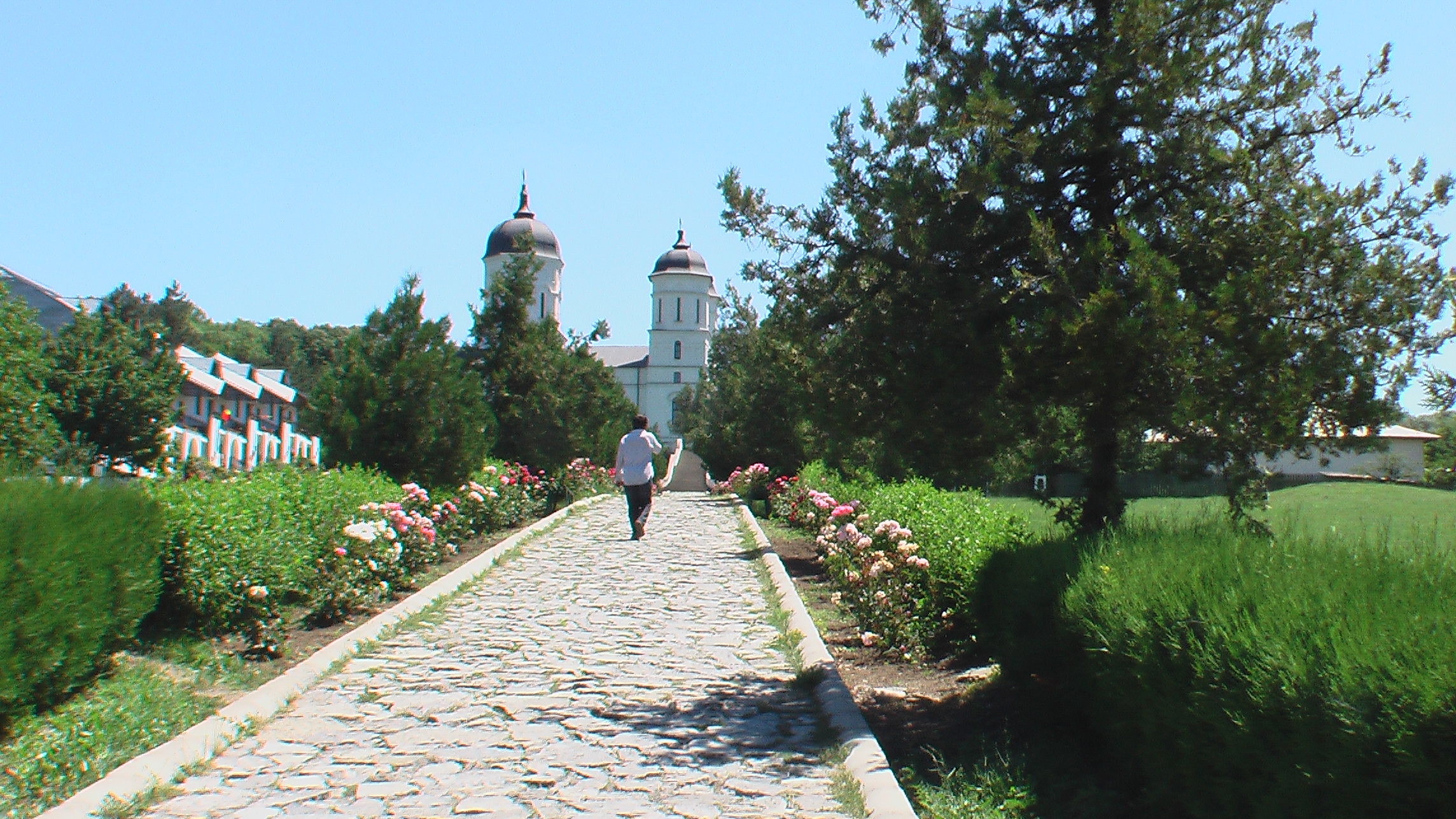 KlosterCelicDere2